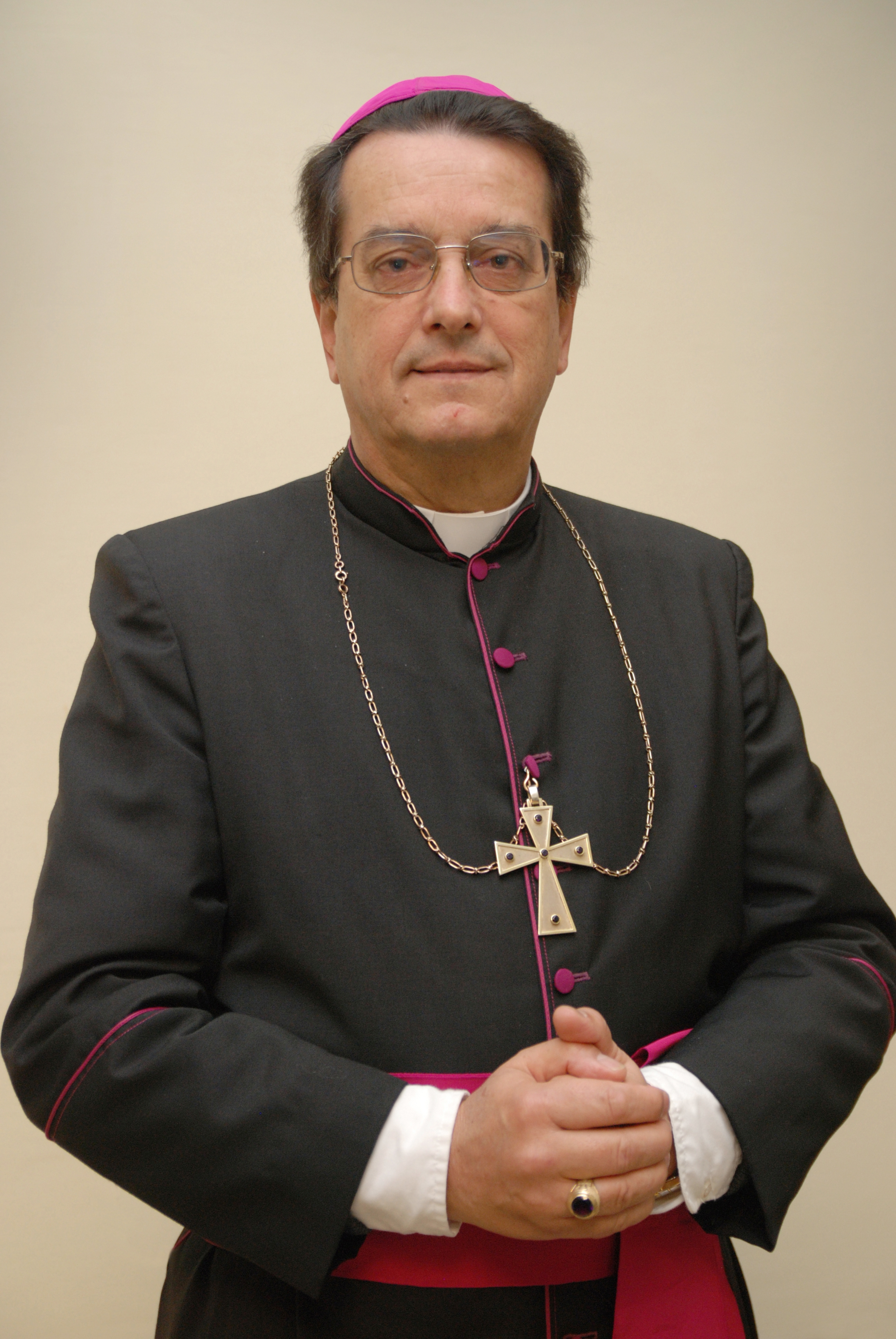 Mons. Dr. Alberto Sanguinetti Montero